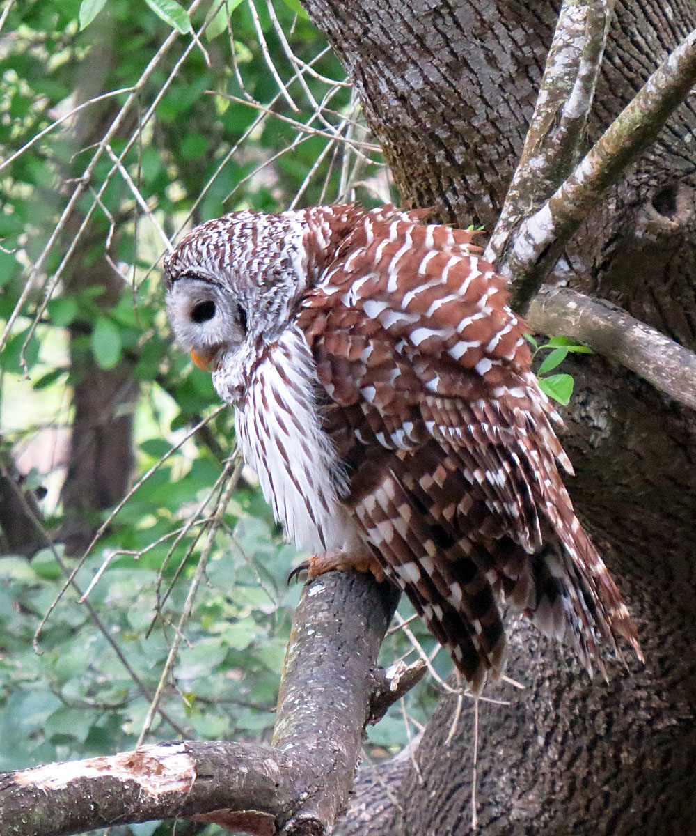 Strix varia georgica 14 Mar 16 Refugio, Texas